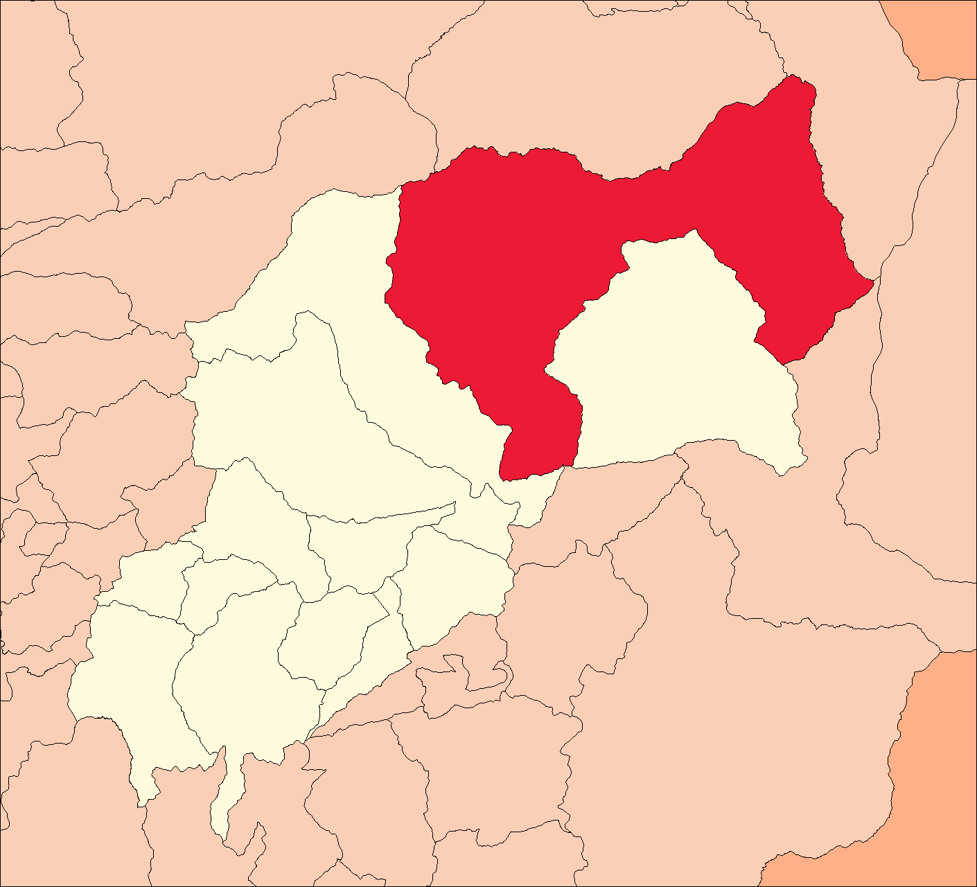 Área del distrito de Chinchao.